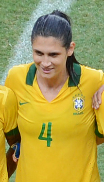 Selecionado feminino do Brasil, campeãs do Torneio Internacional de Brasília - 2013